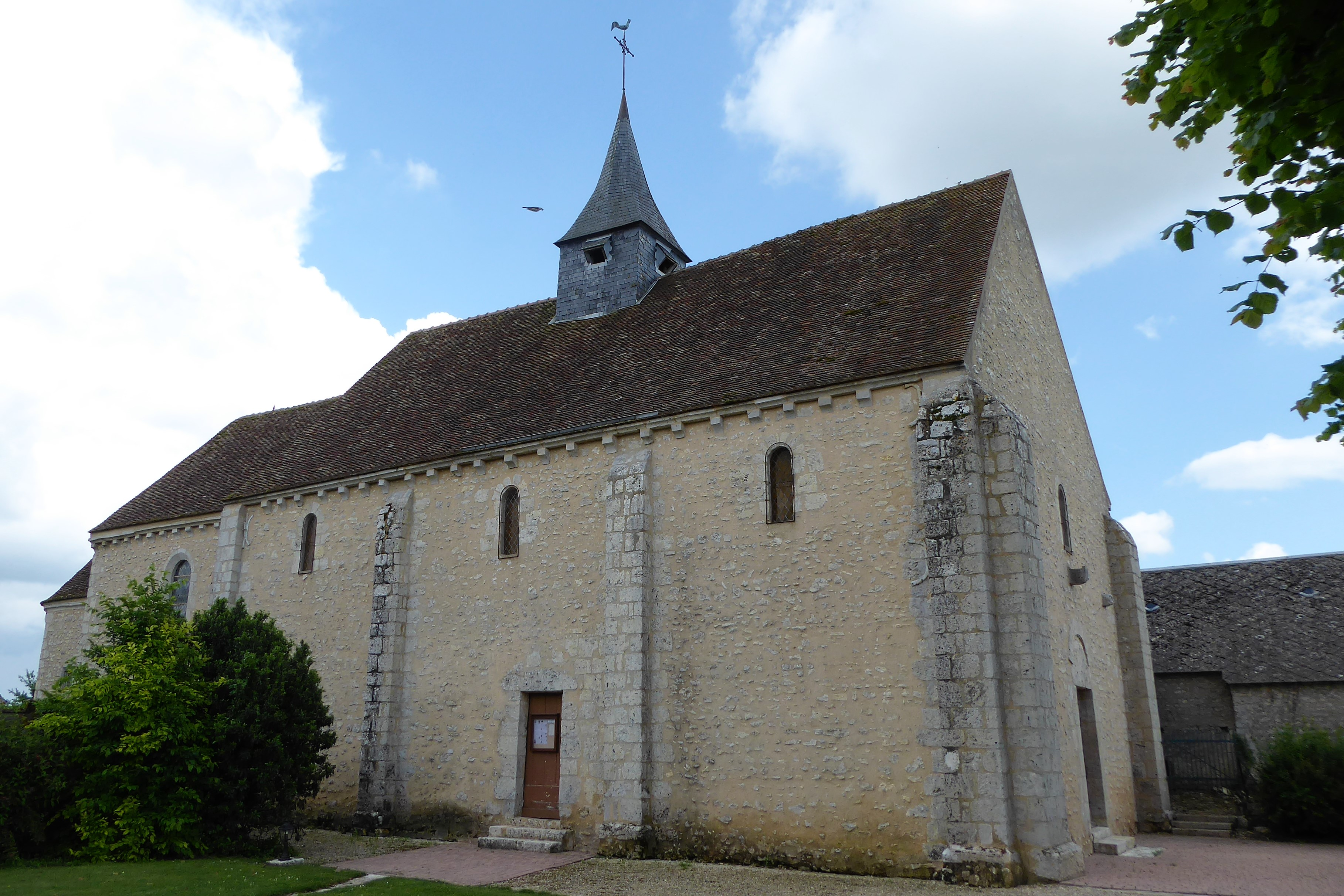 façades ouest et nord de l'église Saint-Georges, Bullainville, Eure-et-Loir, France.